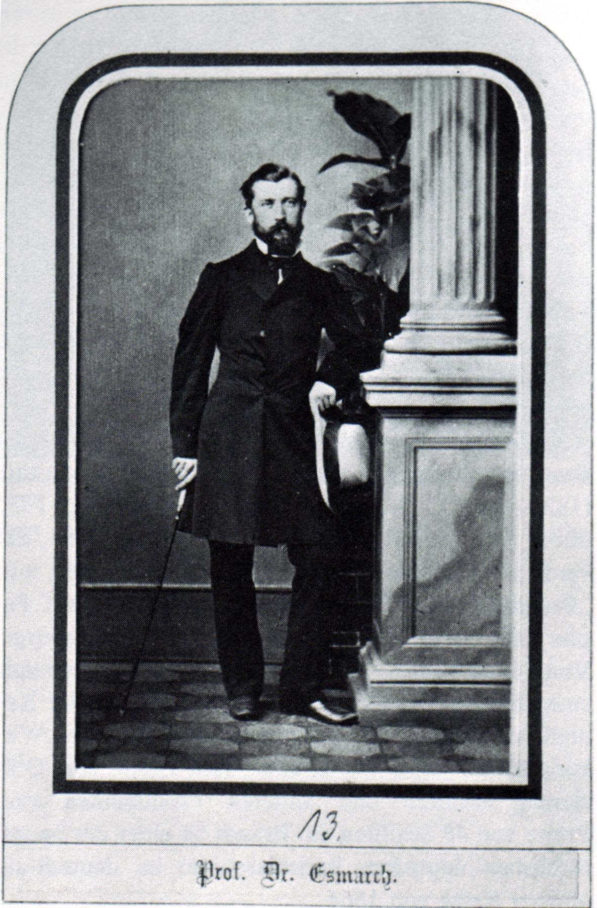 Friedrich August von Esmarch (1823 – 1908), German surgeon.